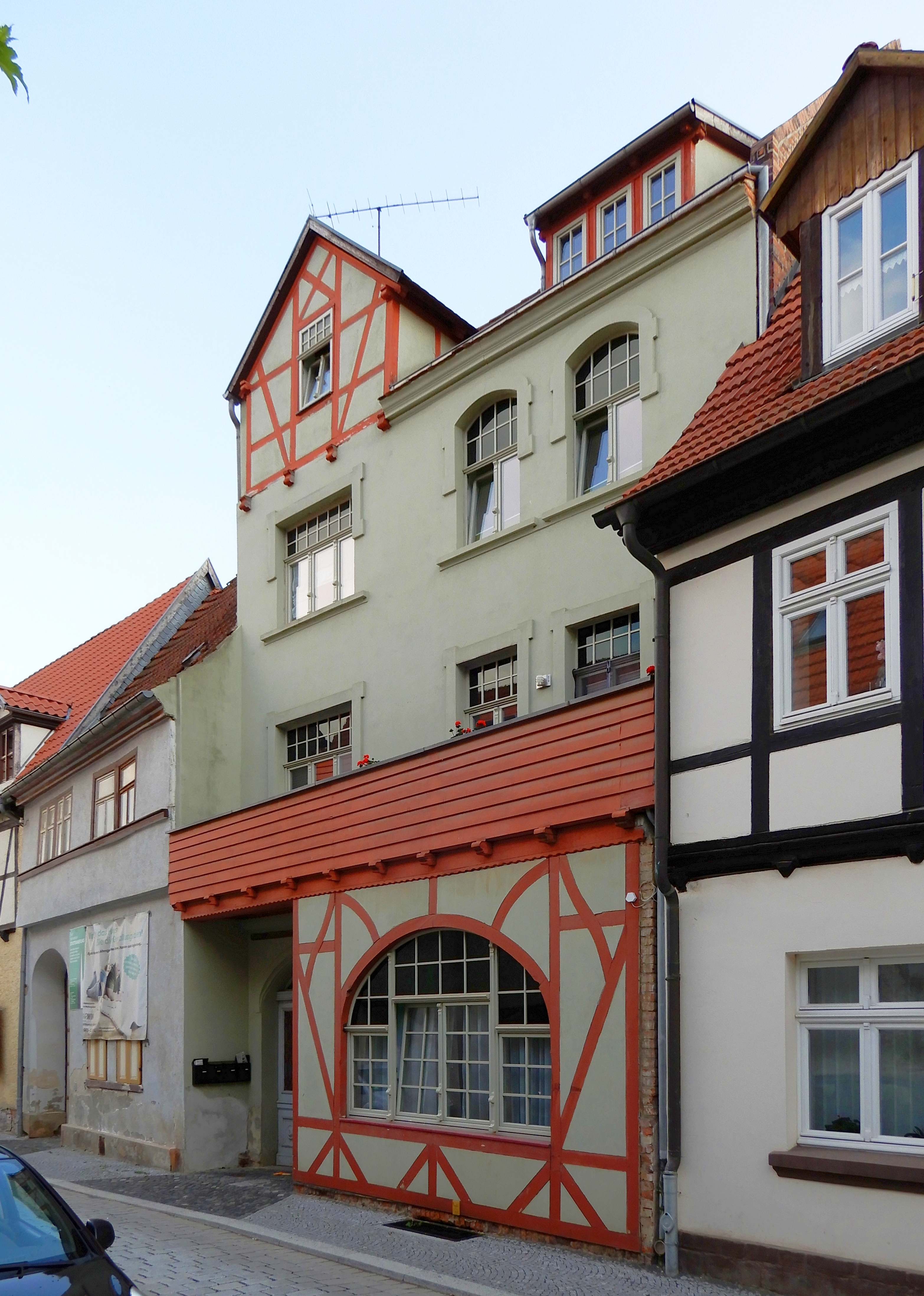 Gebäude Über dem Wasser 5 in Aschersleben